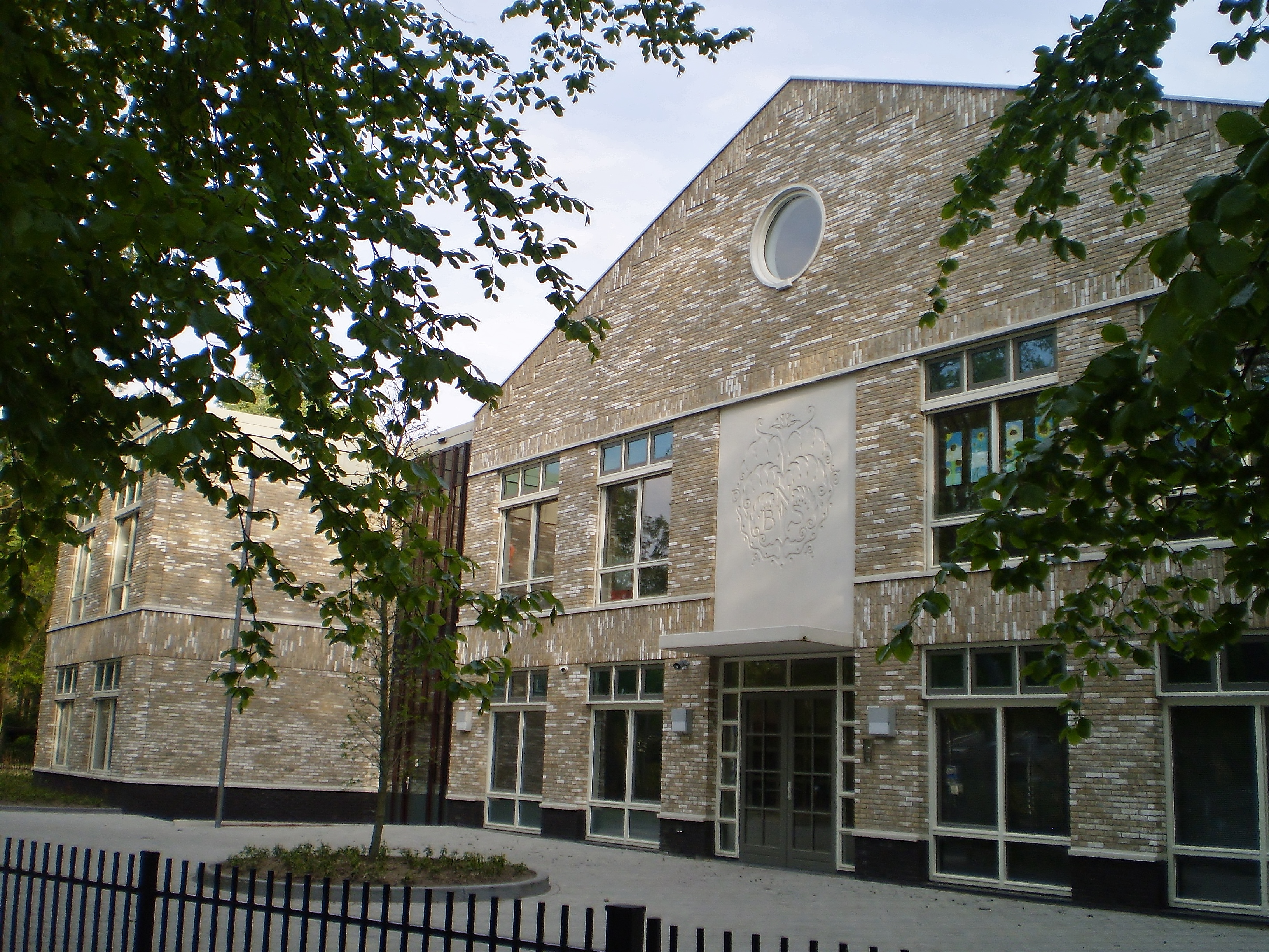 NBS, ingang vanaf de Stationweg